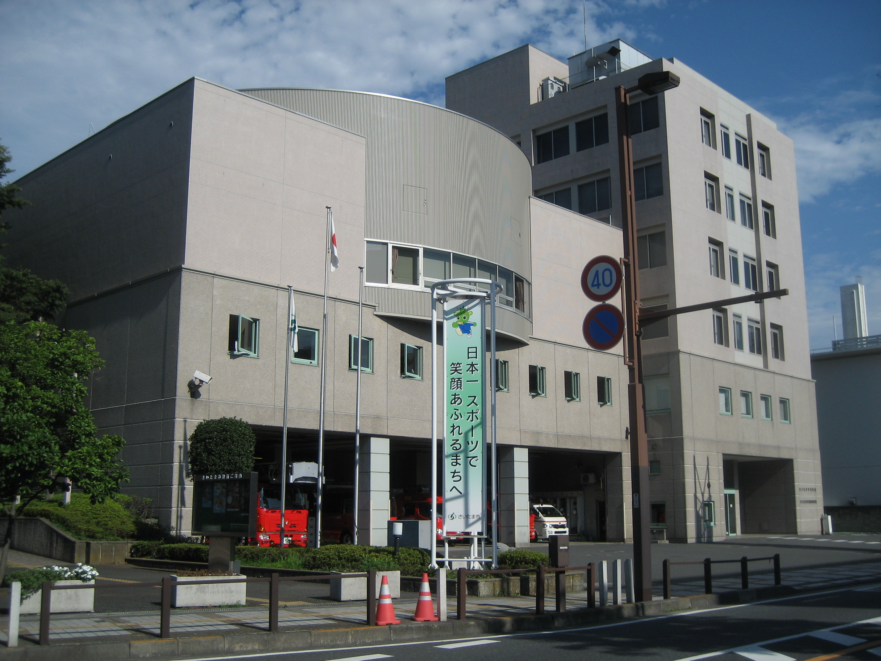 さいたま市消防局・さいたま市消防局浦和消防署庁舎